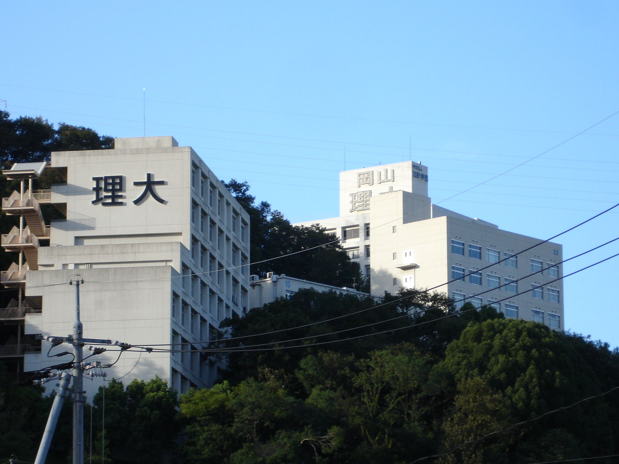 岡山理科大学。2005年9月15日撮影。